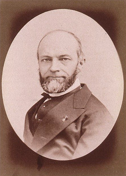 Gustave Steinheil. Meyer, Antoine. Photographe. 1888. Bibliothèque nationale et universitaire de Strasbourg